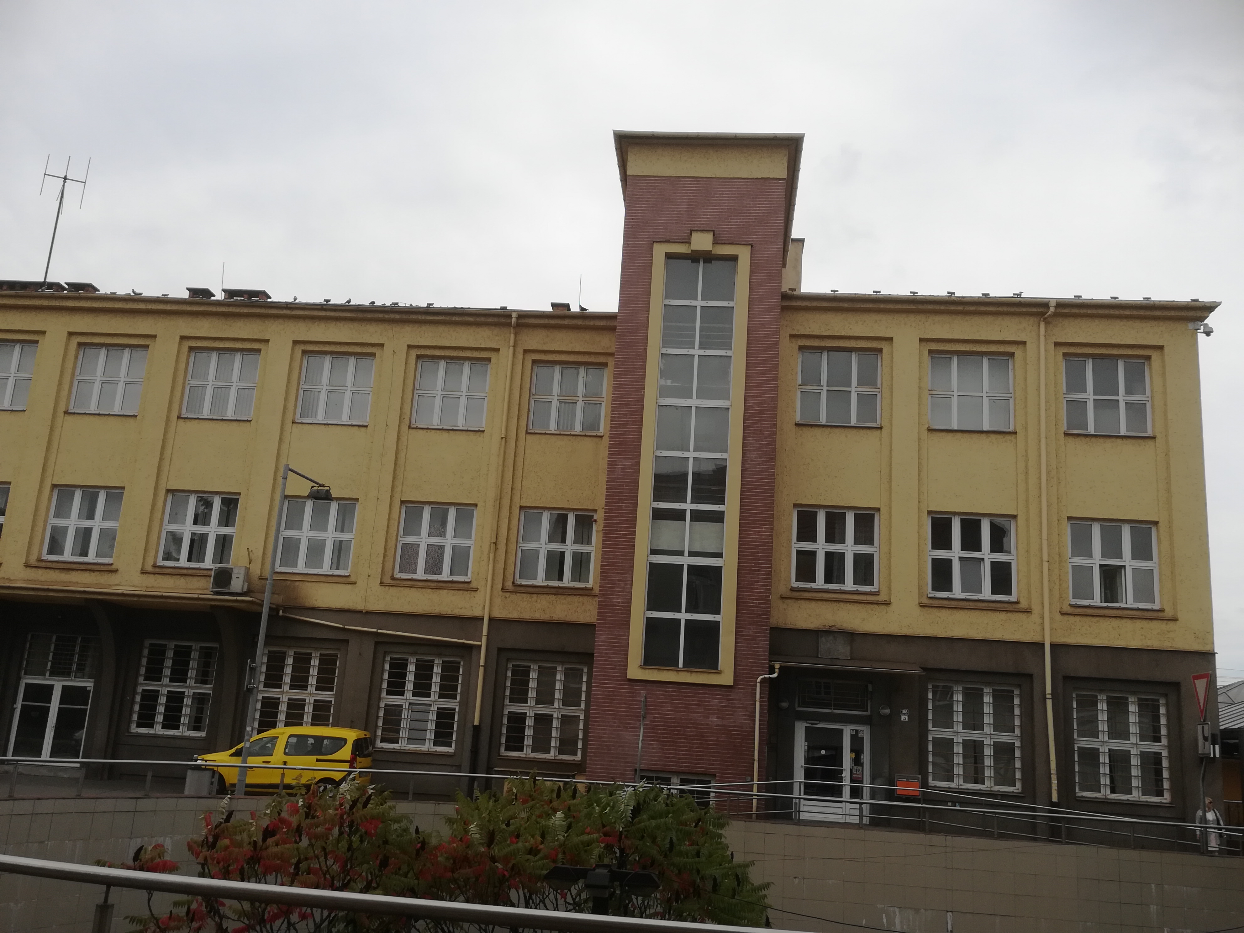 Pošta v Českém Těšíně